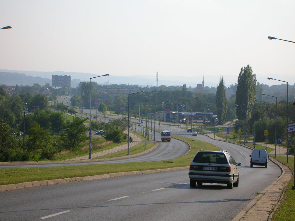 Tarnów - ul.Nowodąbrowska Autor : Bartek Wawraszko (Bast)